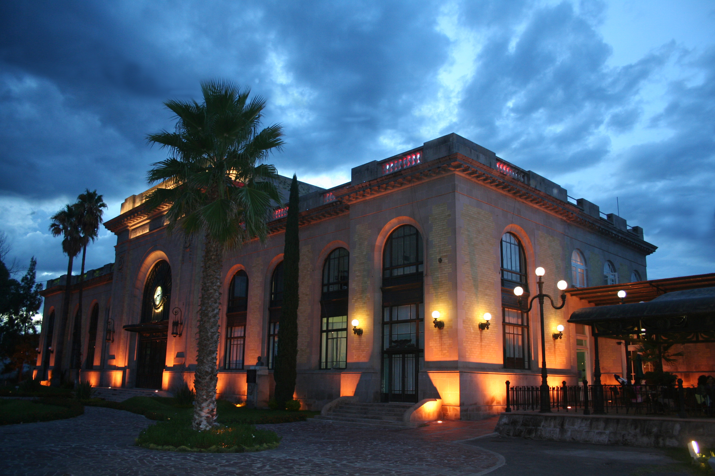 HERMOSA TOMA DE LA FACHADA DE LA ESTACIÓN DE FERROCARRIL EN DURANGO, DGO, MEXICO, EN LA CUAL EL REPLANDOR DEL CIELO AZUL CONFIRMA QUE SE NIEGA A OSCURECERSE A PESAR DE QUE LA ILUMINACIÓN INDICA QUE ES HORA DE INICIAR EL ANOCHECER, ESTA UBICADA EN EL BOULEVARD FELIPE PESCADOR.